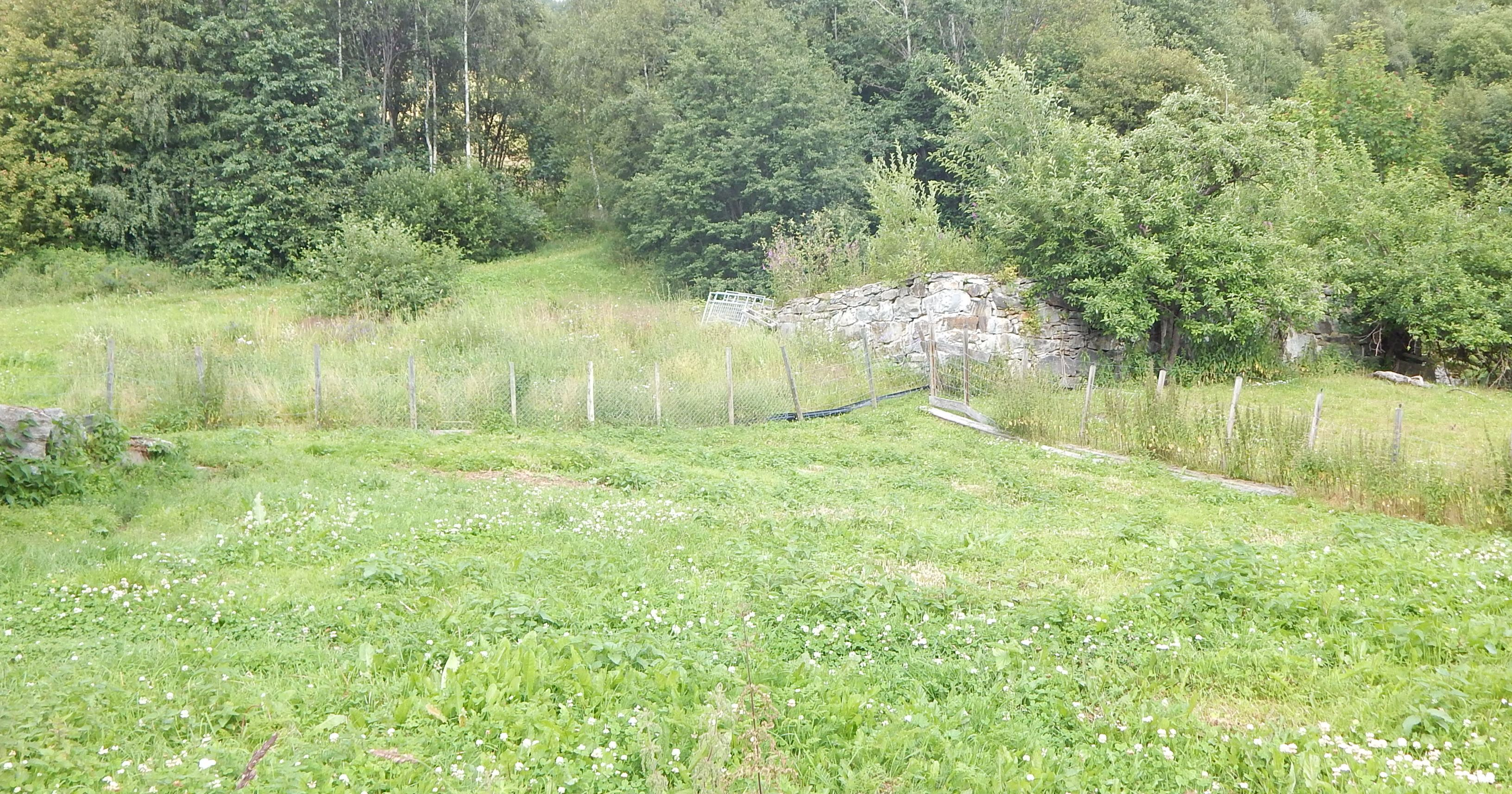 Tidligere Bødalen kirkested ifølge Riksantikvaren, som viser til lokal tradisjon